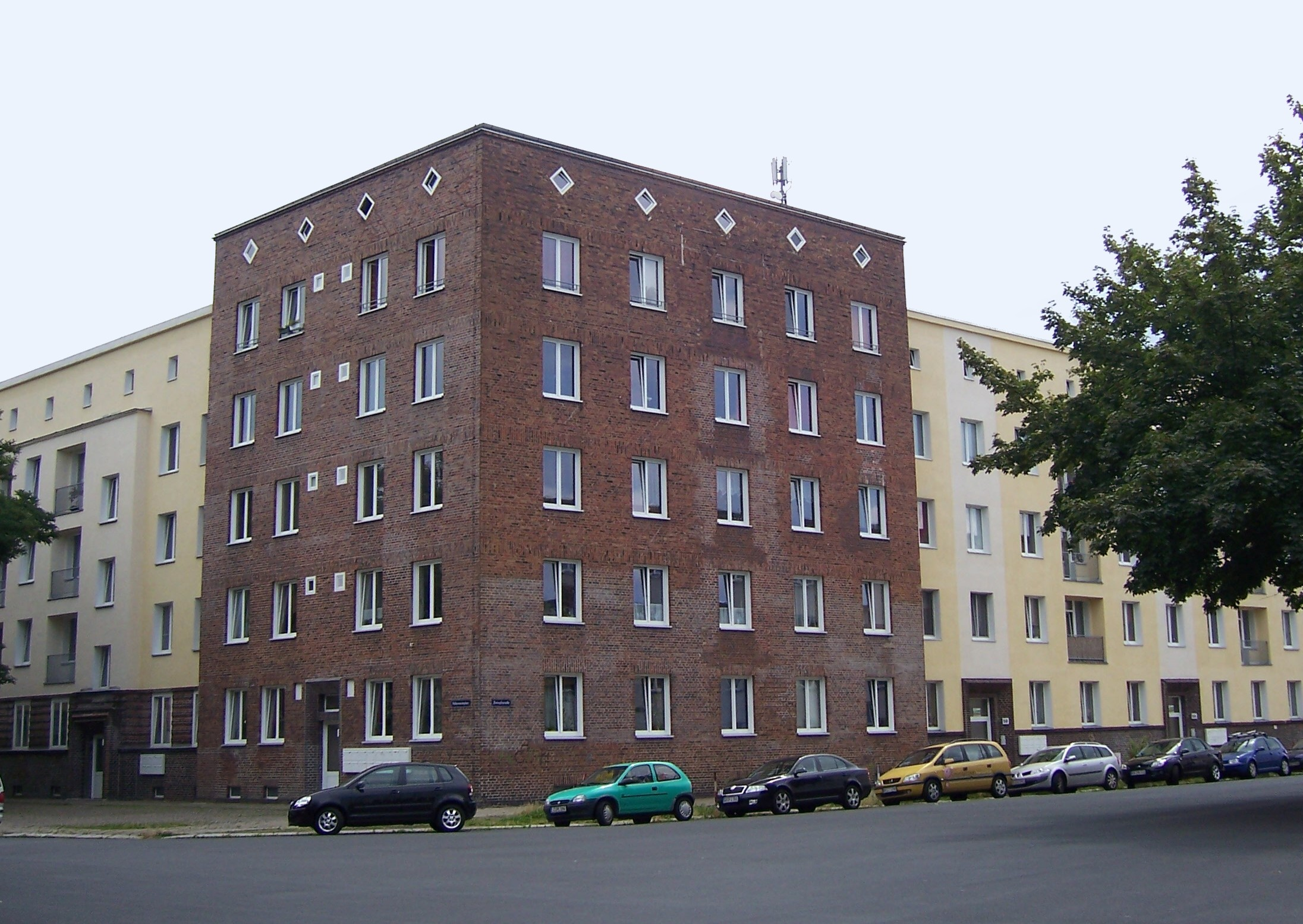 GEWOBAG-Siedlung, hier Haus am Falkensteinplatz, in Dresden-Gruna